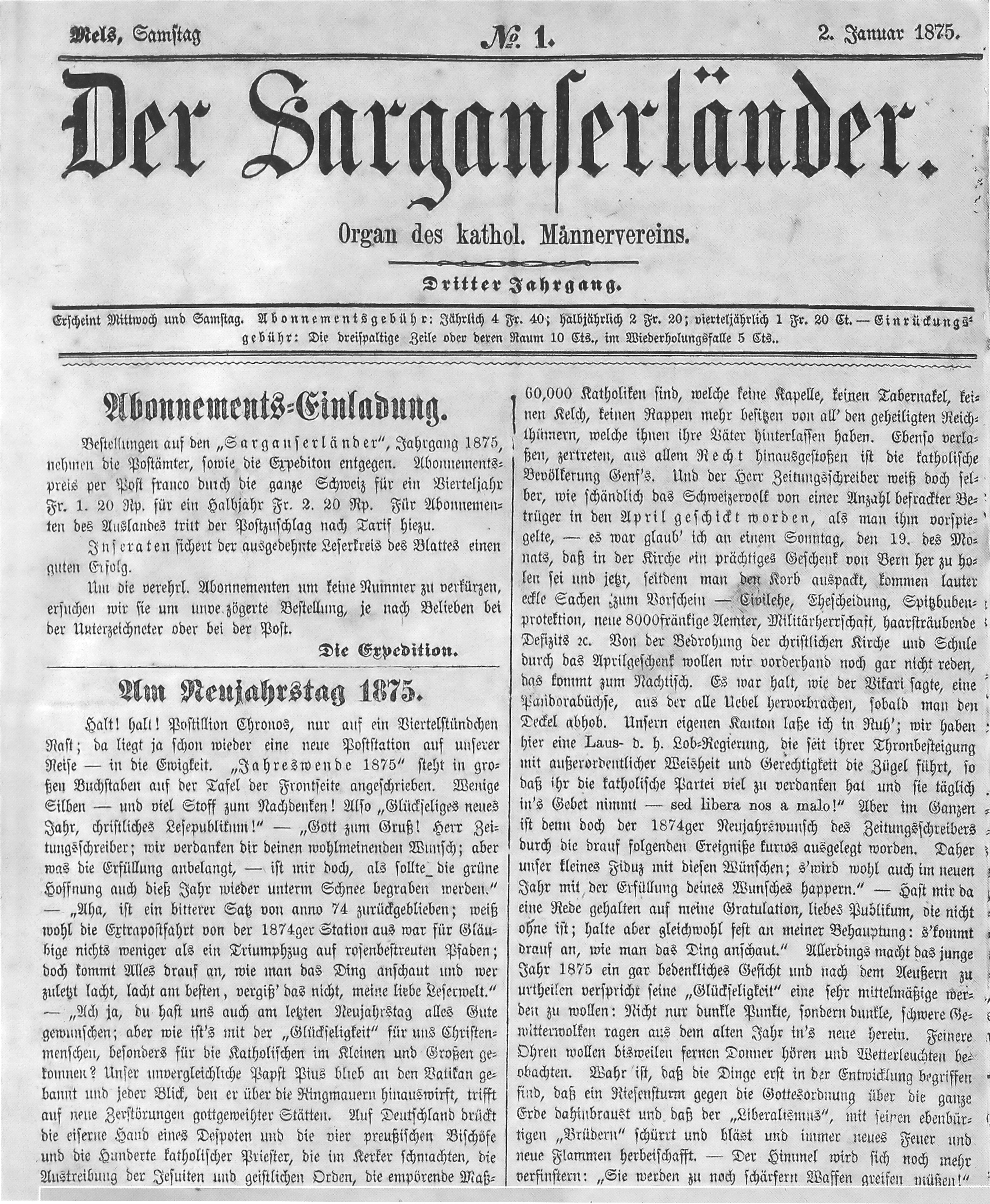 Sarganserländer Nr. 1 (original version)